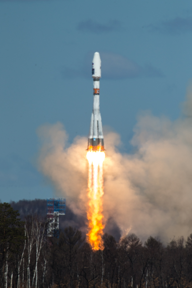 ракета-носитель Союз 2.1А